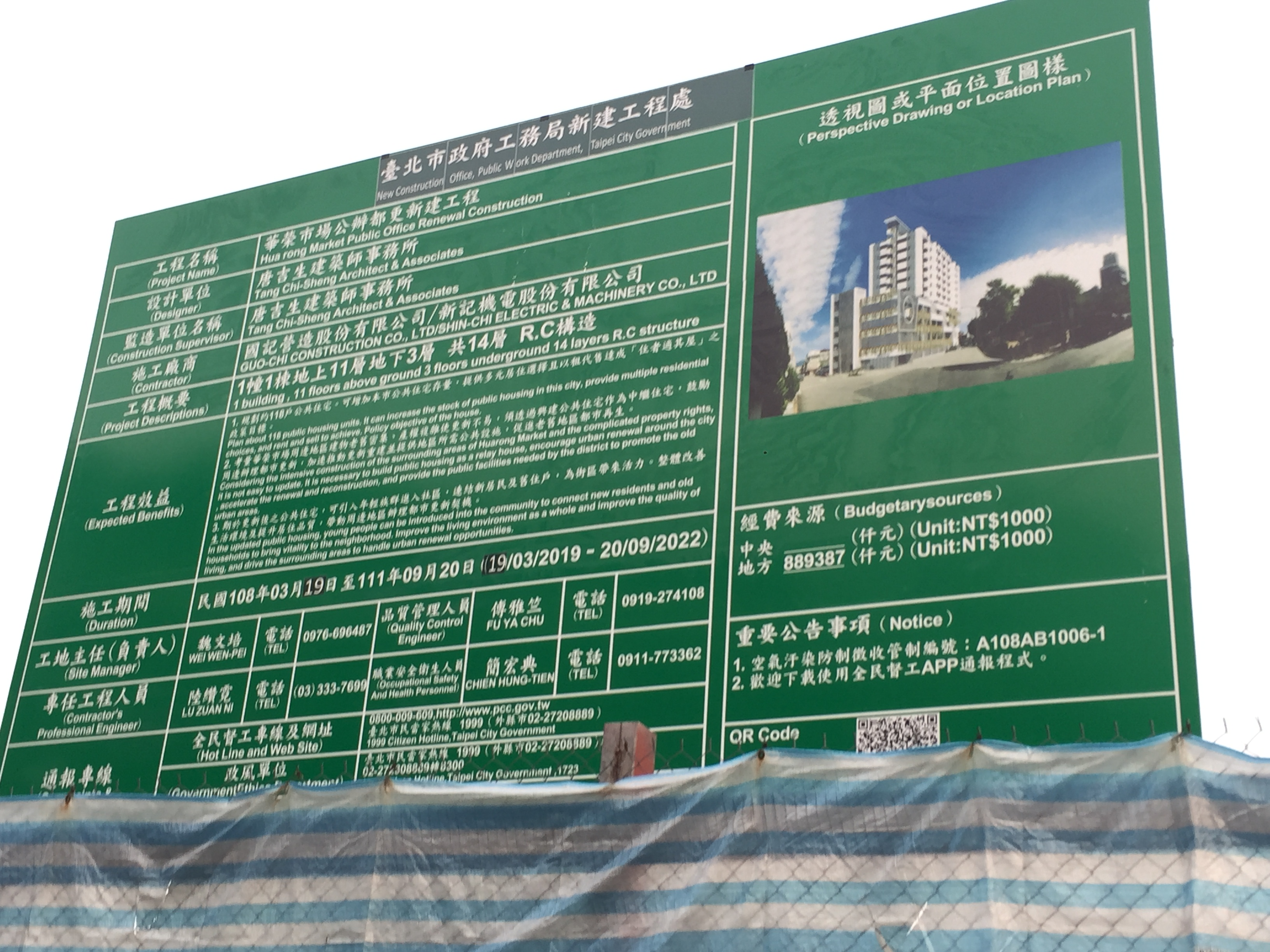 華榮市場公辦都更新建工程告示牌，臺北市政府工務局新建工程處建置。